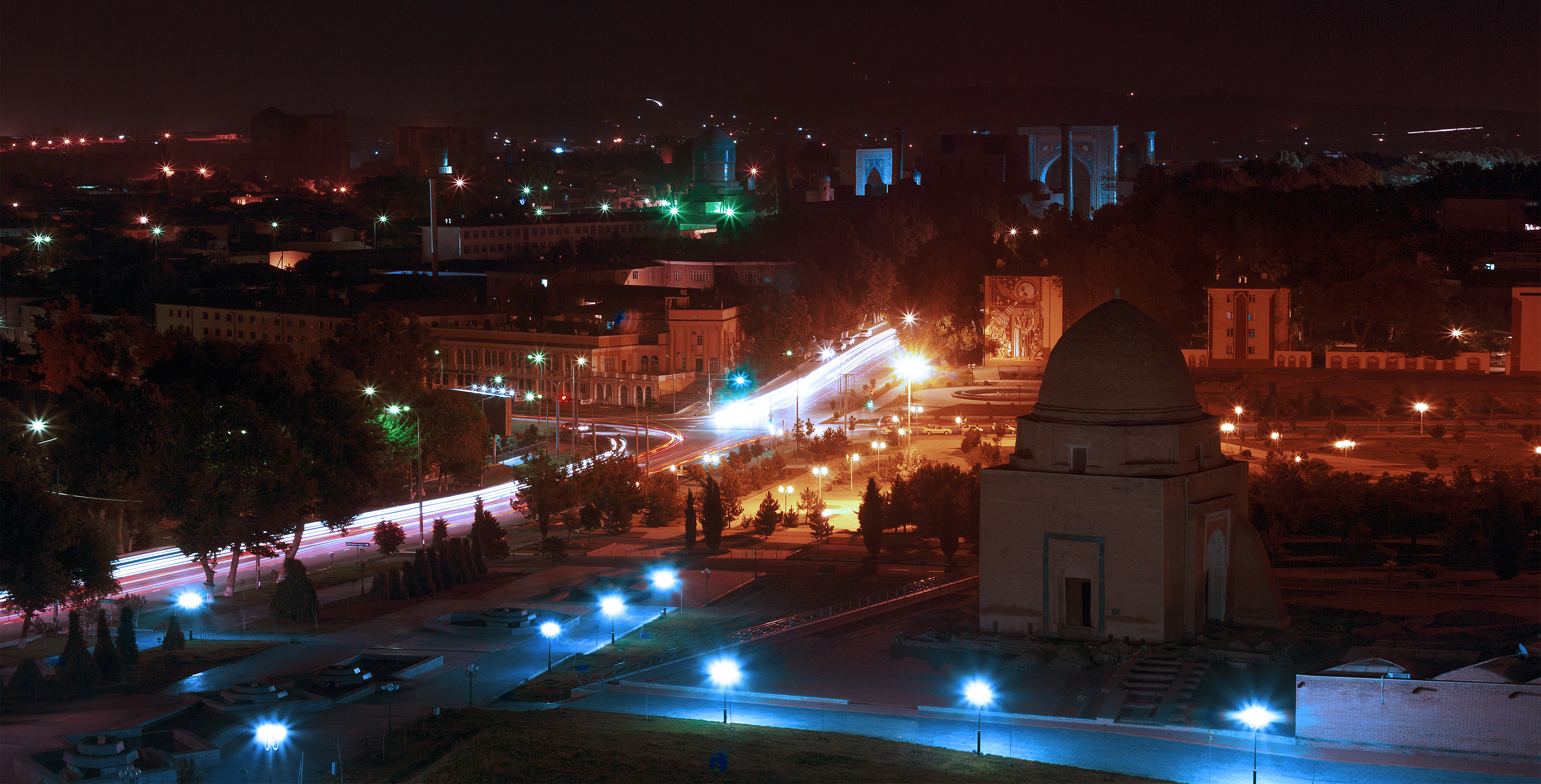 Мавзолей Рухабад.Ruhobod maqbarasi. Руҳобод мақбараси — Обитель духа.Самарканд (By Khusen Rustamov ) Uzbekistan, Samarqand - Узбекистан, Самаркад Photographer: Khusen Rustamov (Хусен Рустамов) Copyright © ART.IRBIS Production Samarkand 2015, Ruhobod maqbarasi (Обитель духа)